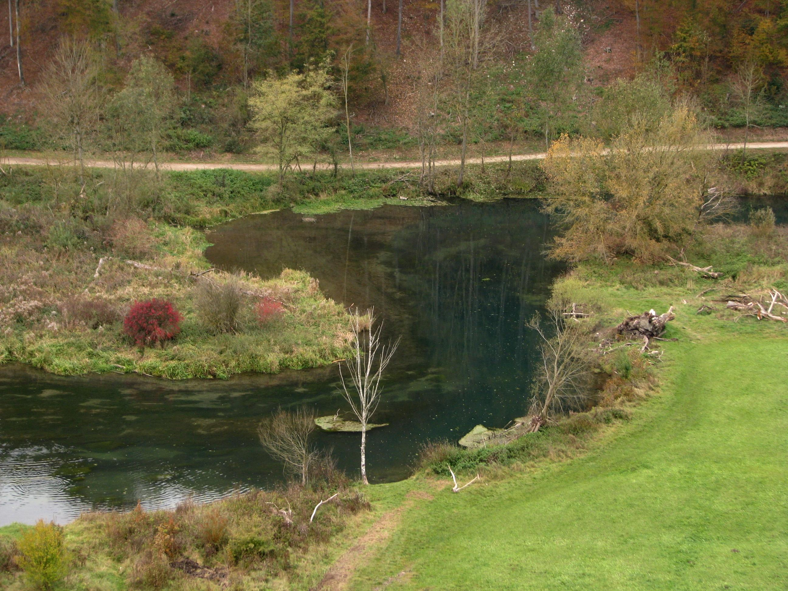 Mäander des Flusses Brenz im Eselsburger Tal.